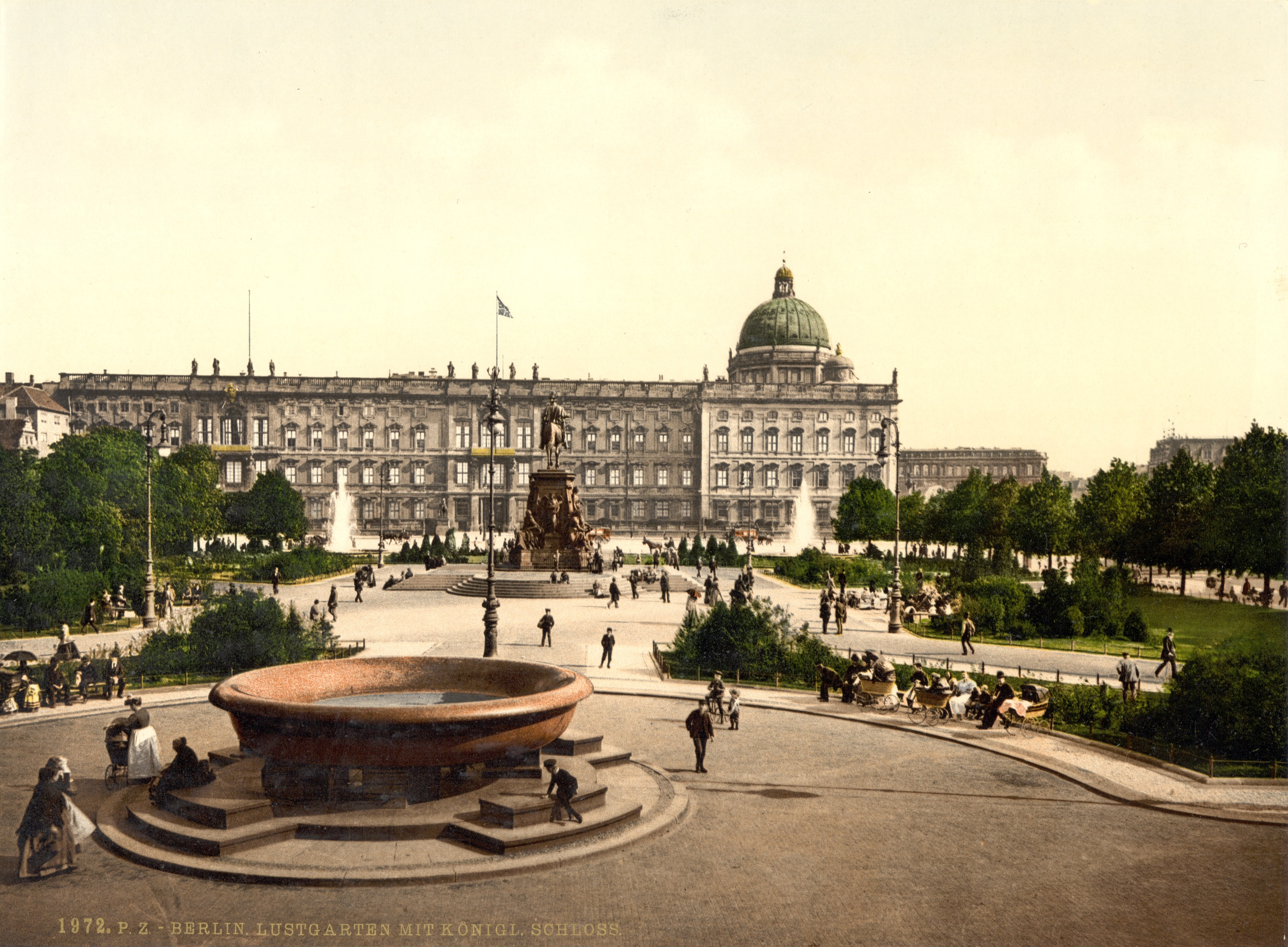 Berliner Stadtschloss zwischen 1890 und 1900